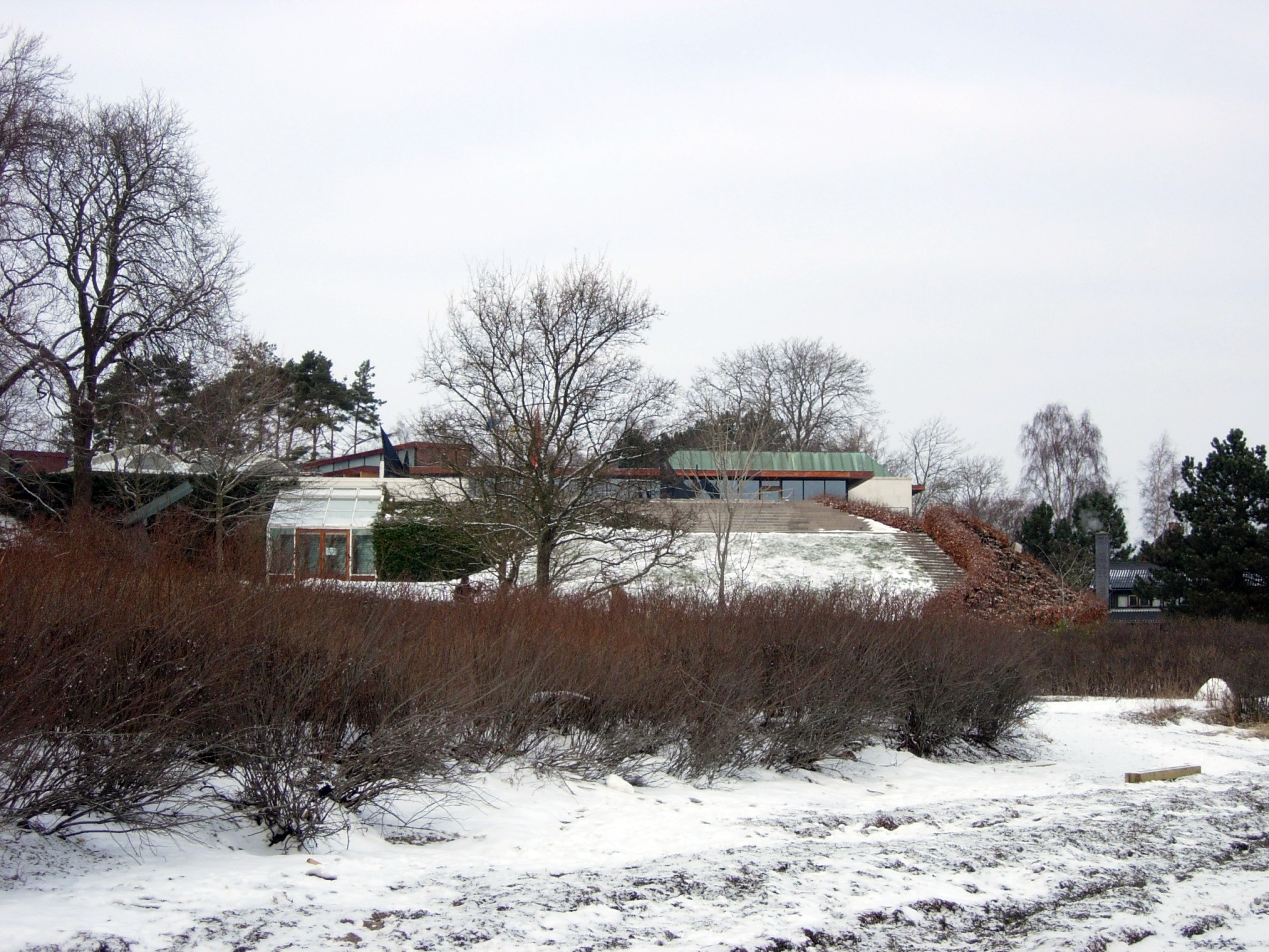 Louisiana Museum for Moderne Kunst (outside), Humlebæk